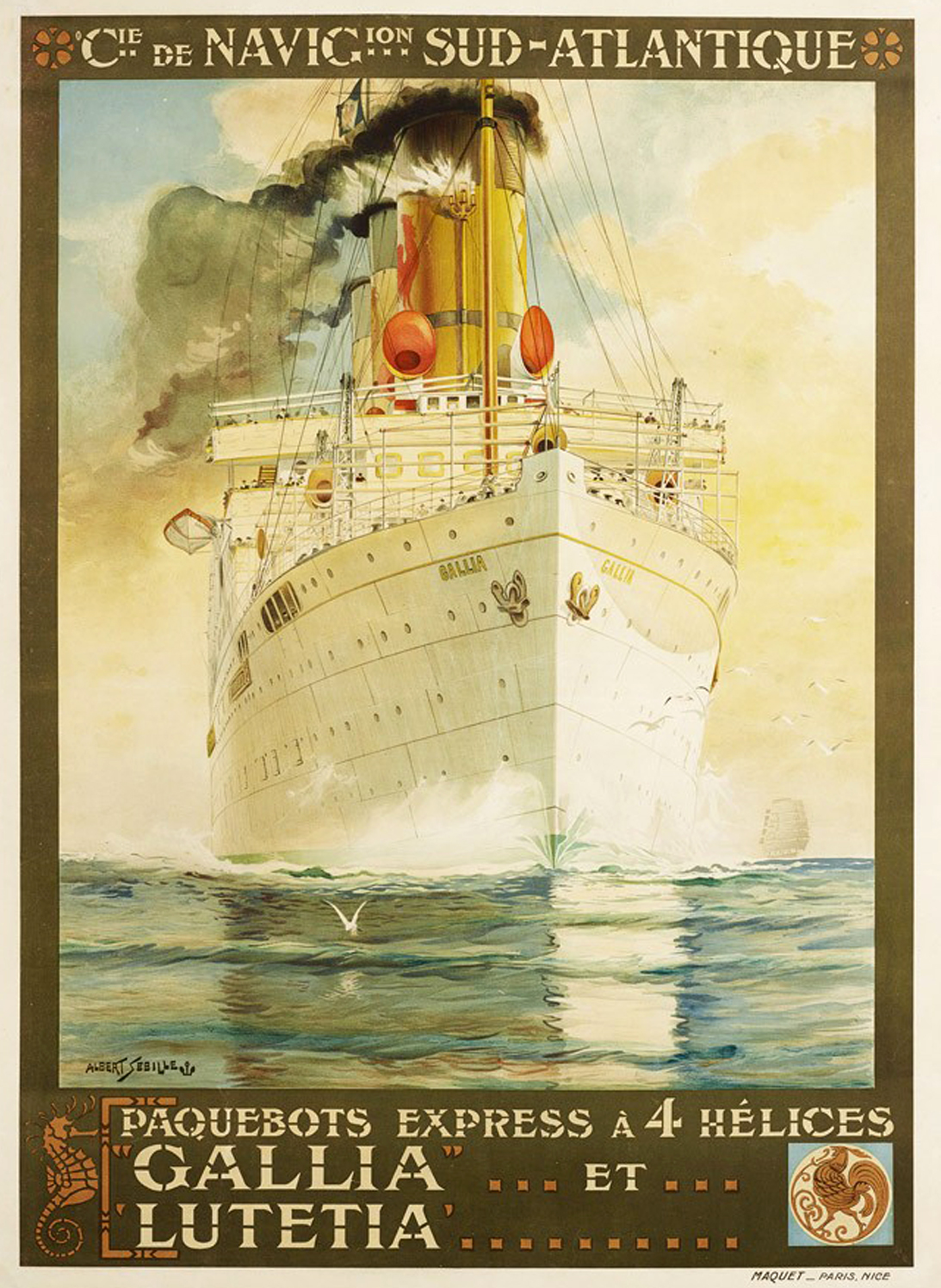 Werbeplakat der Compagnie de Navigation Sud-Atlantique mit Schiff Gallia aus dem Jahre 1913